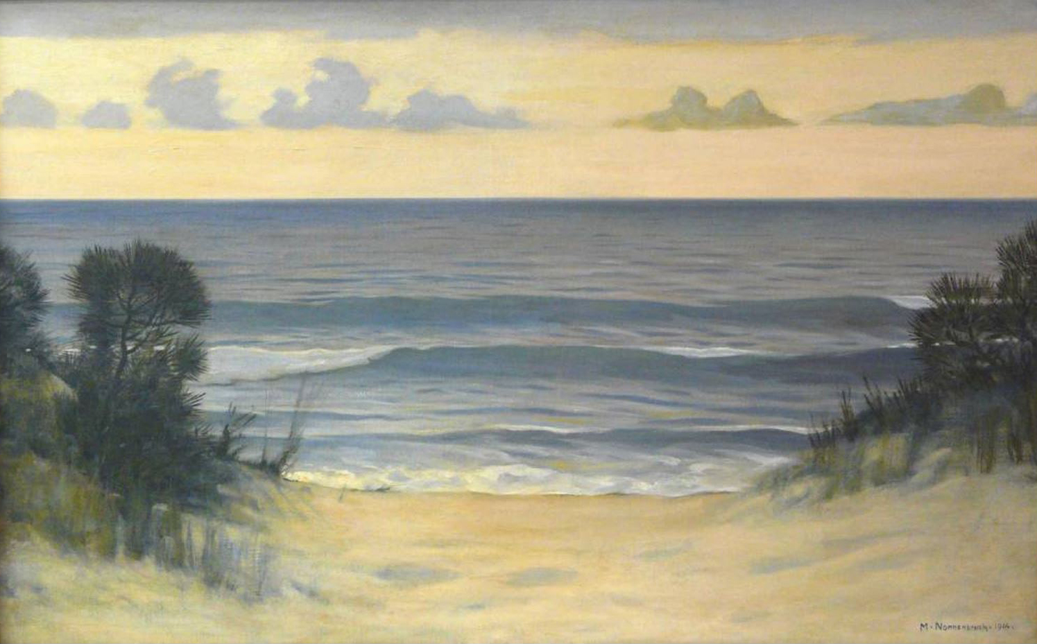 Max Nonnenbruch, Dünen am Strand (auch Dünen am Ostseestrand. Doch ist steht nichts von "Ostsee" oder überhaupt ein Titel auf dem Bild oder der Rückseite.), Öl auf Leinwand, 70 × 110 cm. Unten rechts signiert und datiert „M. Nonnenbruch 1914“.